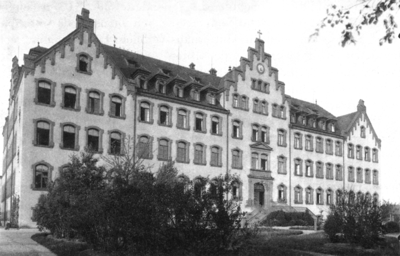 Schulhaus der Diakonissenanstalt, das heutige Zentralschulhaus des Löhe-Campus